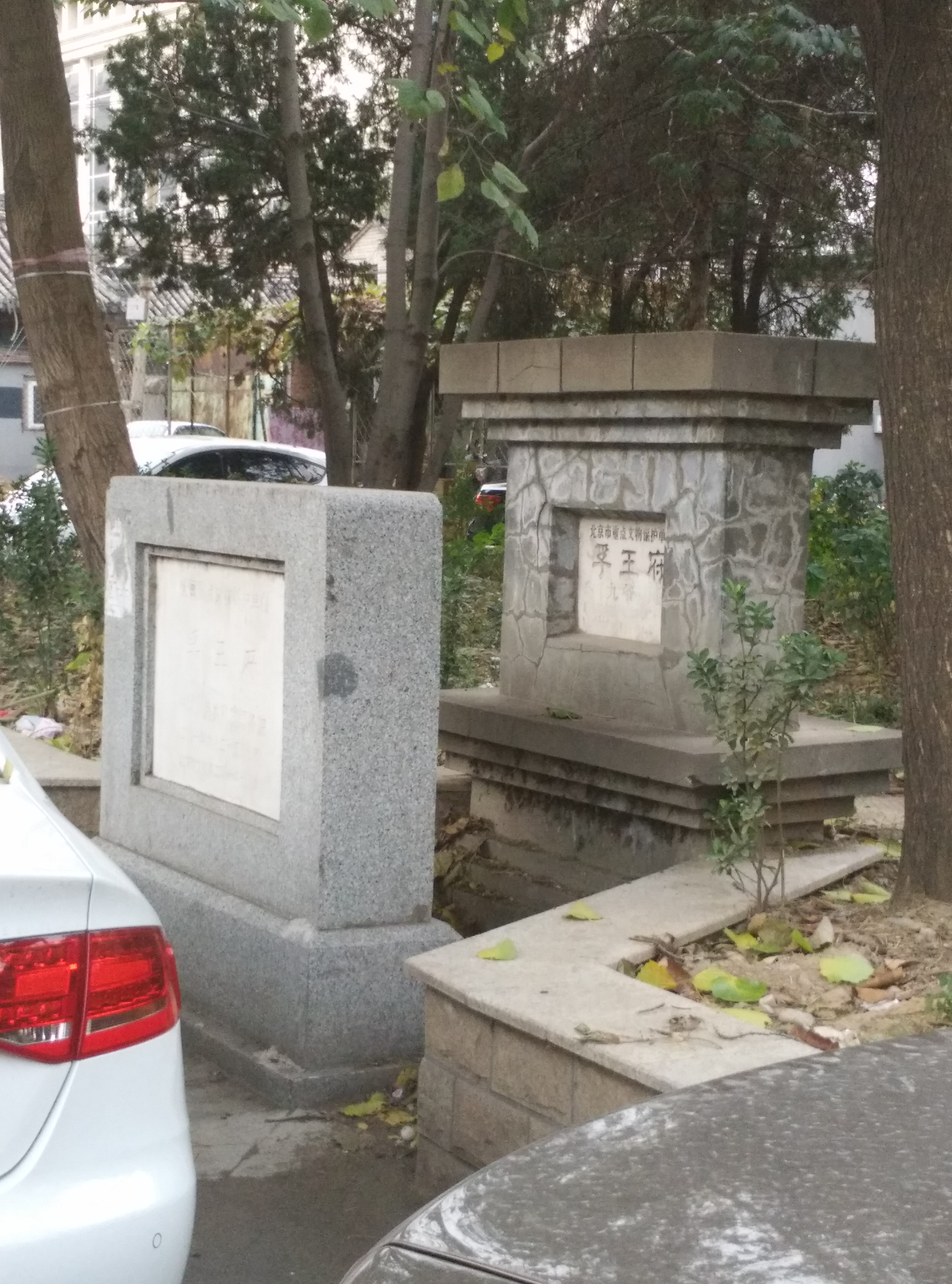 中文（中国大陆）: 孚王府的两块文保碑